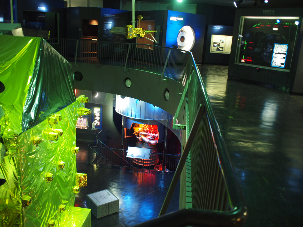 種子島宇宙センターにある宇宙科学技術館の内部展示